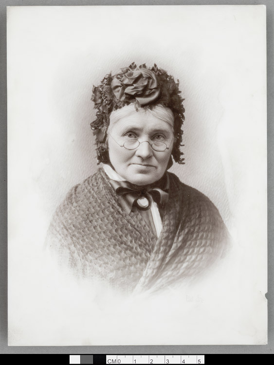 Ffotograffydd/Photographer: Elliot & Fry. Dyddiad/Date: [ca.1890] Cyfrwng/Medium: Opalotype Maint/Dimensions: 220 x 165 mm Cyfeiriad/Reference: fmc00127 Rhif cofnod / Record no.: 3359405 Ceir mwy o ffotograffau a rhagor o wybodaeth ar wefan y Llyfrgell Genedlaethol. More images and further information can be found on the National Library of Wales' website.